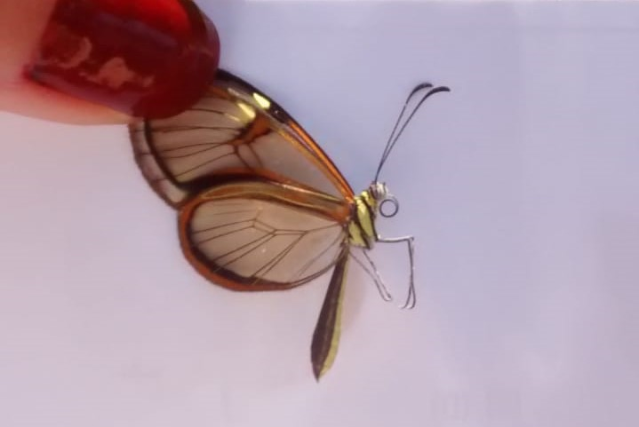 Foto de adulto de borboleta Episcada hymenaea, registrada em 18/05/2018, em atividade do Avistar 2018 no Instituto Butantan - São Paulo - SP. Foto por: Juliana Lira Picture of Episcada hymenaea imago, taked on May, 18th, 2018, in an Avistar 2018 activity at Butantan Institute - São Paulo - SP. Picture taked by: Juliana Lira.